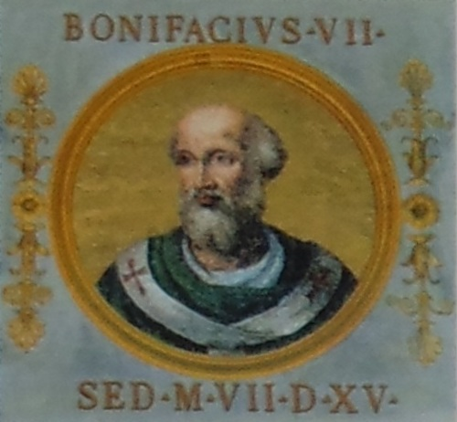 Efigie de Bonifacio VII en la Basílica de Sn. Pablo Extramuros, Roma.